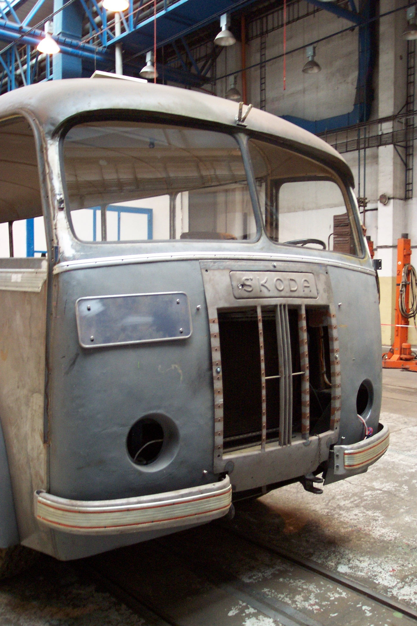 Historical Škoda RO bus, under reconstruction - Historický autobus typu Škoda RO procházející rekonstrukcí